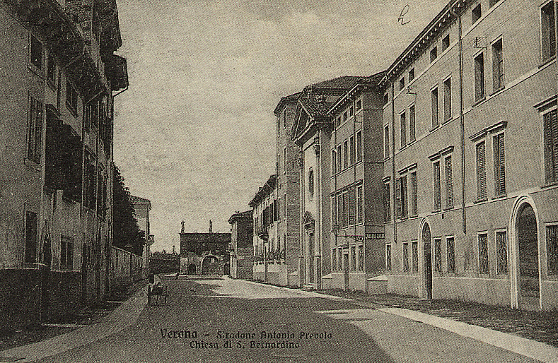 Stradone Provolo a Verona in una foto d'epoca. Si noti il convento di San Bernardino